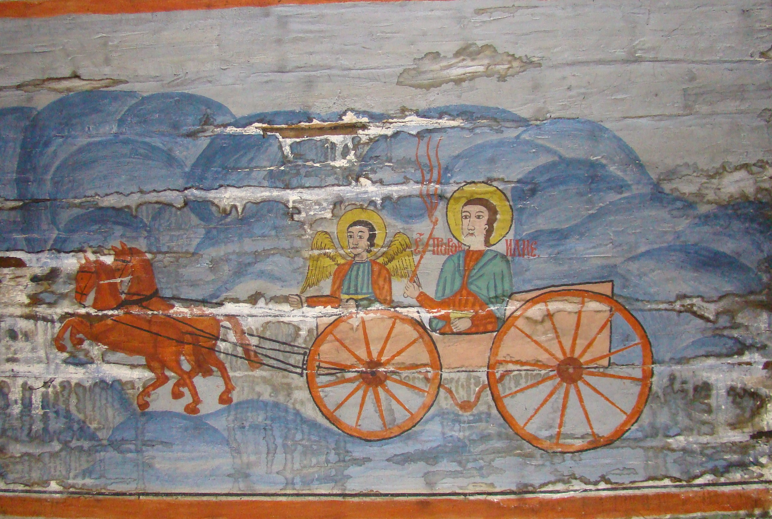 Biserica de lemn „Sfinții Arhangheli” din Ocolișel, județul Cluj